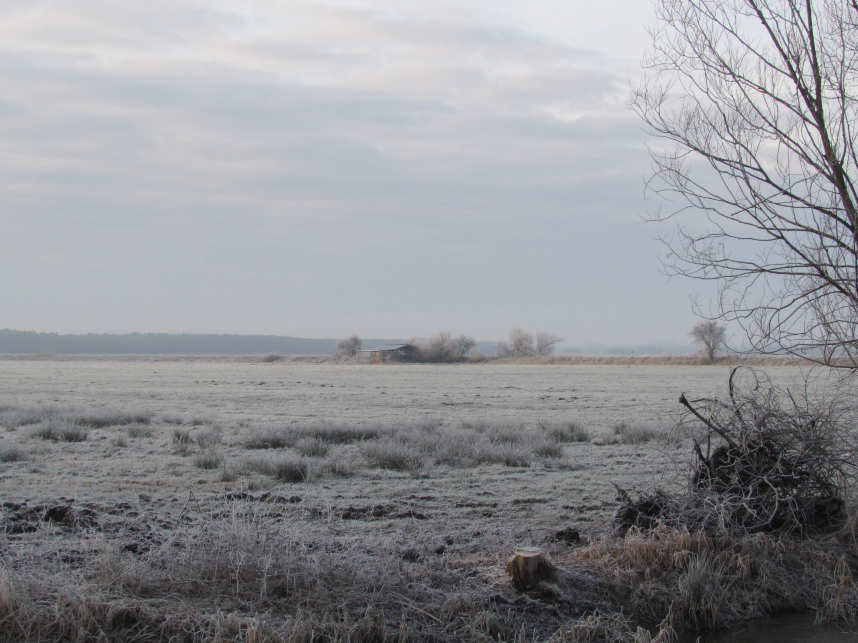 fiener bruch, im hintergrund der ehemalige bahndamm der linie von wusterwitz nach görzke